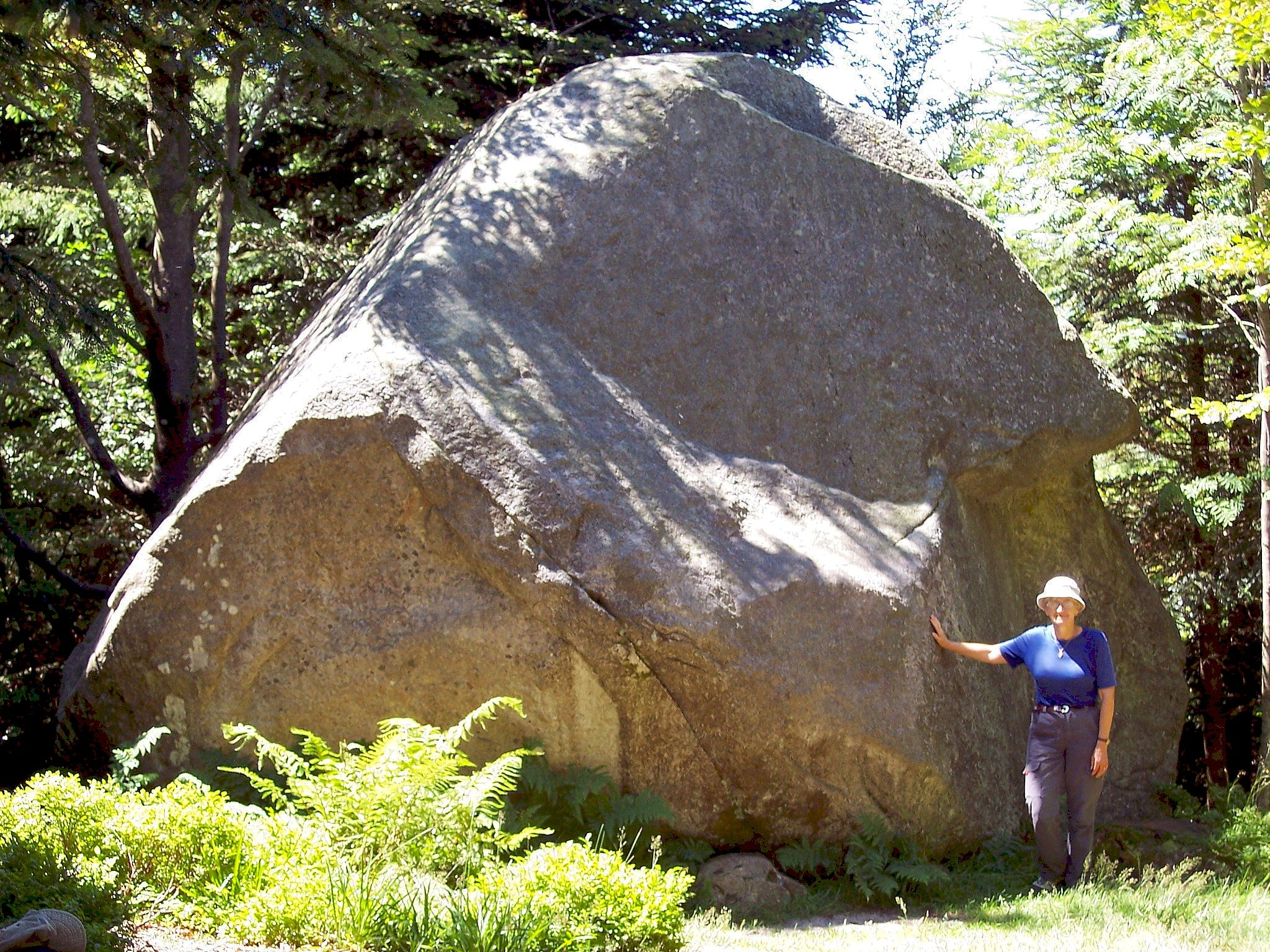 Rocher de la boule du Diable. Dans la forêt dominant au sud le lac de Longemer. Vosges